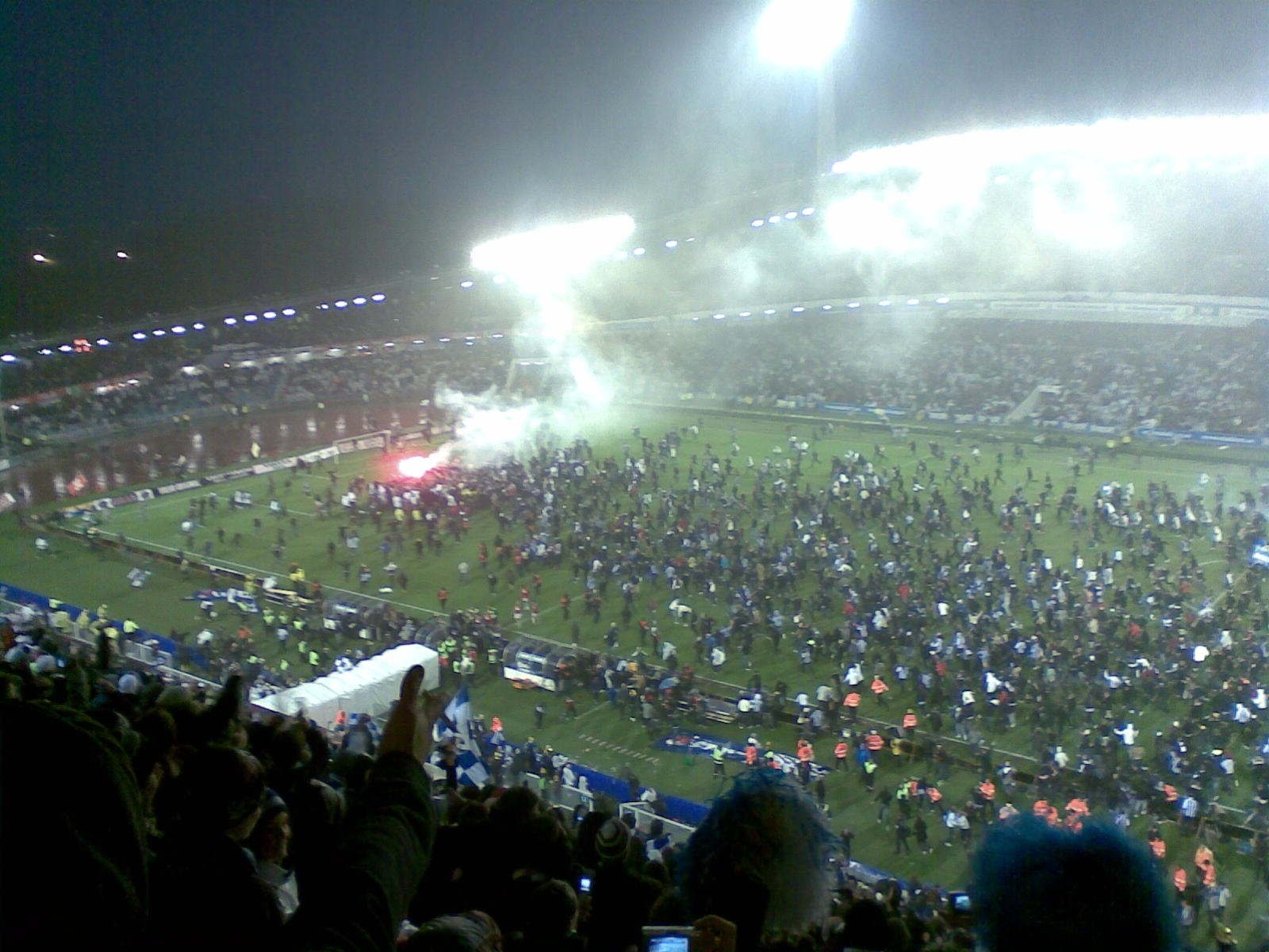 IFK Göteborg (IFK Gothenburg) Swedish Champions. Picture taken just seconds after end of Fotbollsallsvenskan game IFK Göteborg-Trelleborgs FF (2-0).